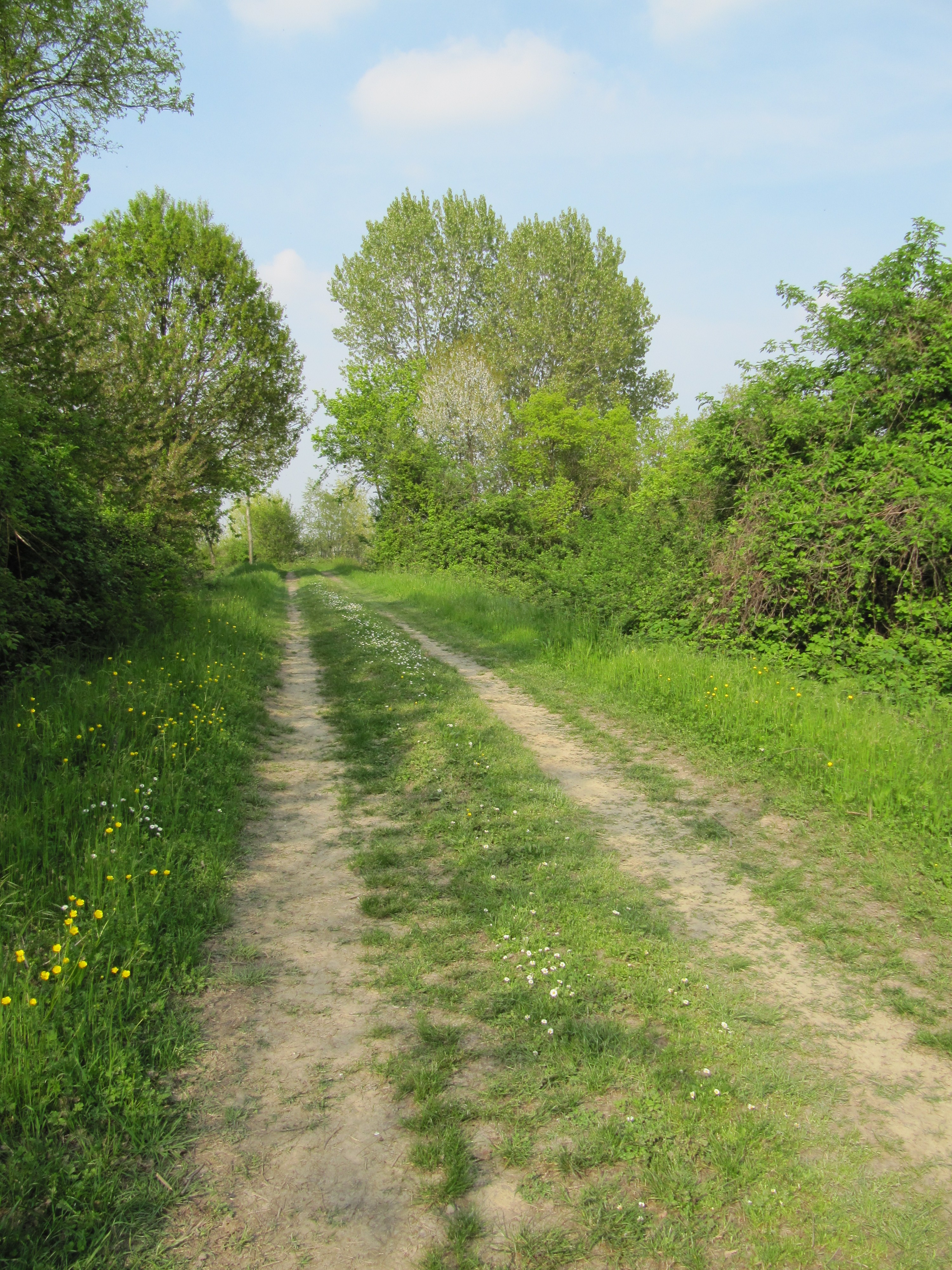 Arginello circondariale visto da Villa Pasquali verso Breda Cisoni